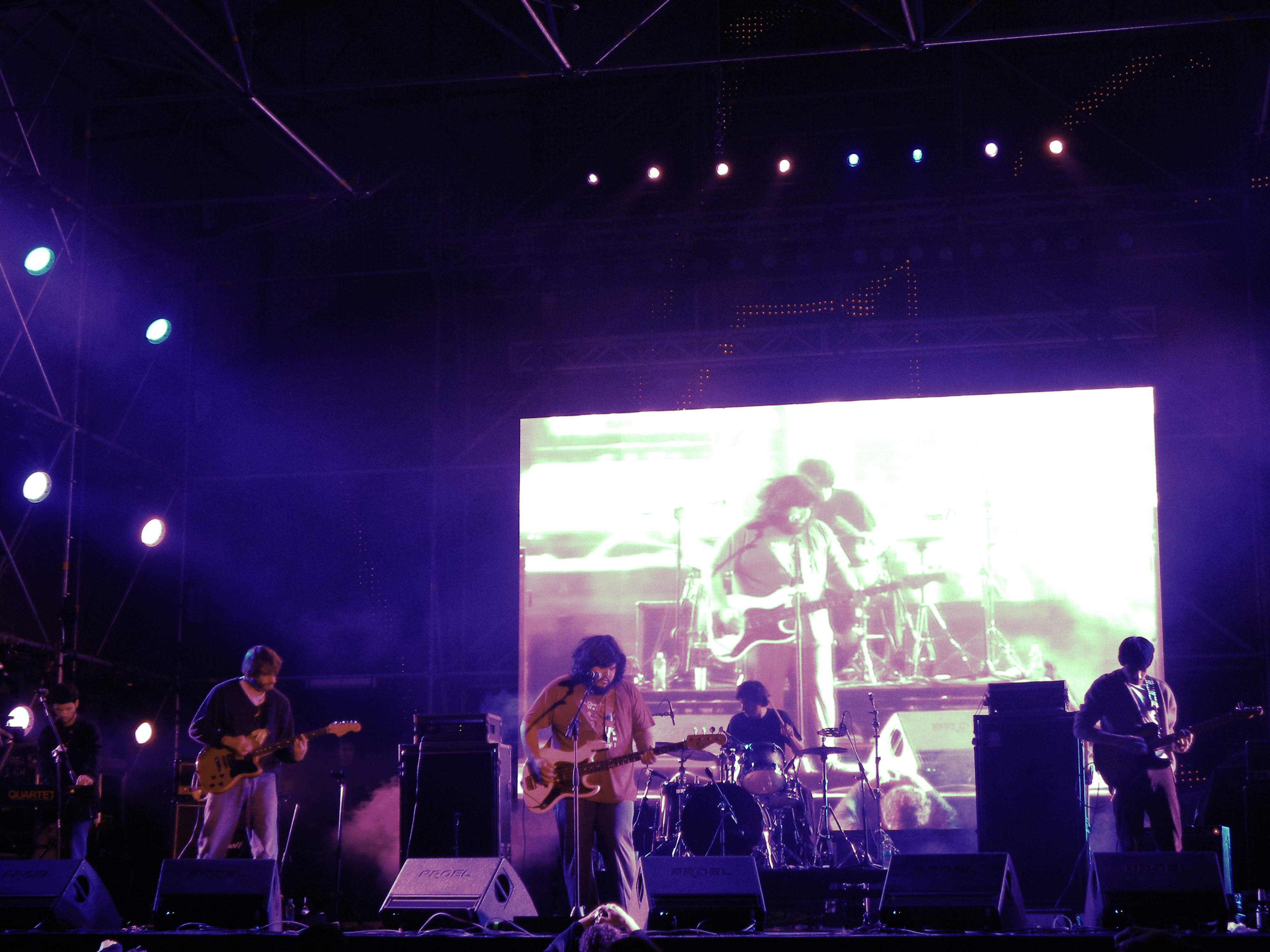 Él Mato A Un Policia Motorizado en vivo en el Espacio Joven del Parque Temático Tecnópolis, Vicente López, Argentina. 05/08/2011